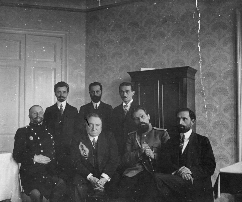 მოსკოვის ქართველთა საზოგადოების კომიტეტი. ალექსანდრე ივანეს ძე სუმბათაშვილ-იუჟინი - რუსი დრამატურგი, მსახიობი. წარმოშობით ქართველი. რსფსრ სახალხო არტისტი (1922). 1863-1877 წლებში ცხოვრობდა საქართველოში. დაკრძალულია მოსკოვში, ნოვოდევიჩის სასაფლაოზე. ივანე თულაშვილი - სამხედრო ტოპოგრაფი, ინჟინერ-პოლკოვნიკი. მიხეილ ზანდუკელი - ექიმი. ალექსანდრე ჯავახიშვილი - გამოჩენილი მეცნიერი. სუმბათაშვილ-იუჟინი, ალექსანდრე ივანეს ძე (1857 - 1927) ზანდუკელი, მიხეილ ჯავახიშვილი, ალექსანდრე თულაშვილი, ივანე ხორავა, ნ. გამბარაშვილი, მაქსიმე